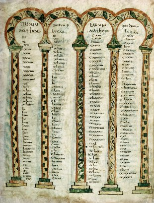 Page du canon d'Eusèbe de Césarée. F° 10v. Autun, Bibliothèque Municipale. Ms 3.